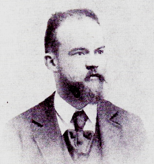 Foto di Giuseppe Rensi